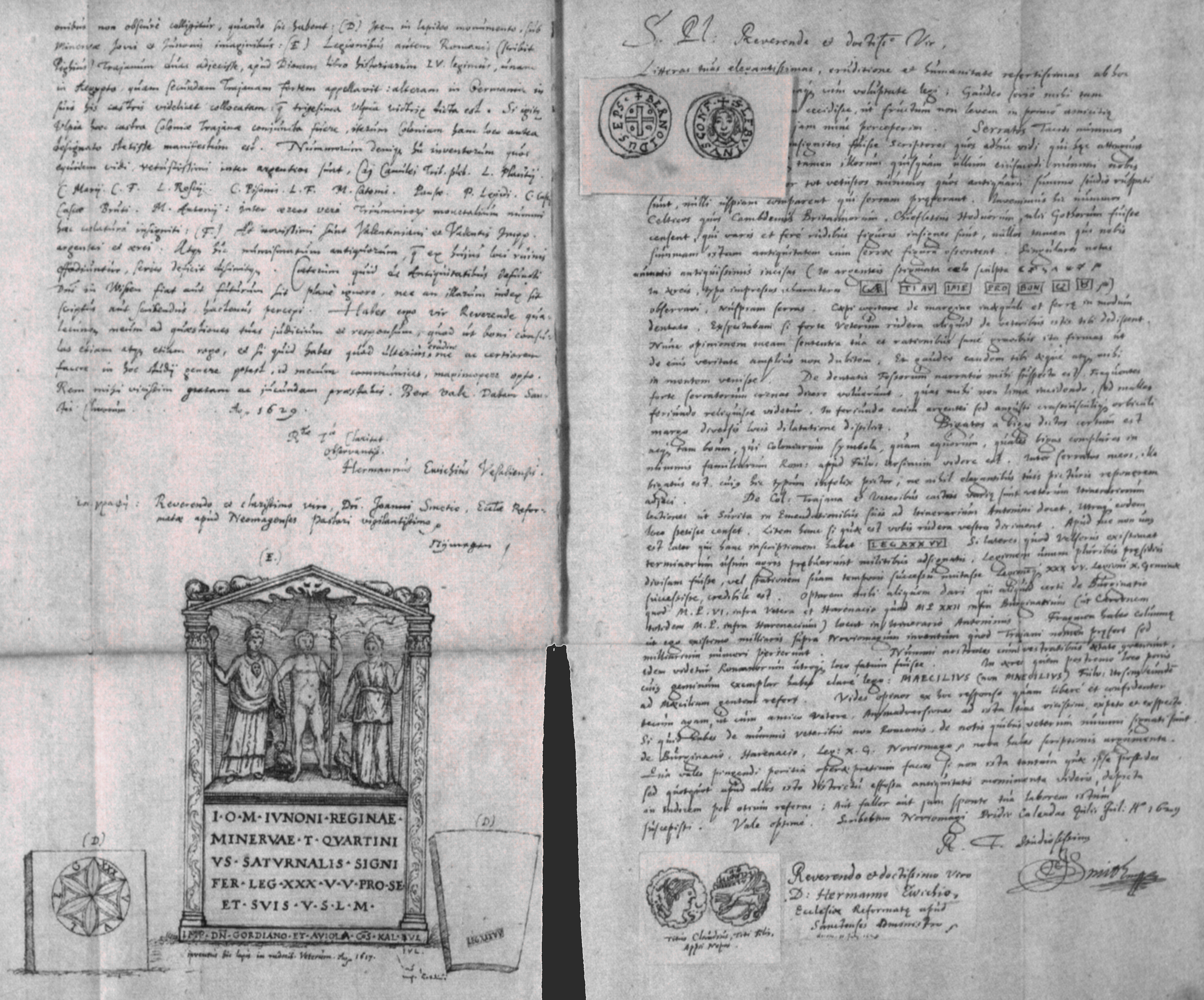 Blatt 76 aus dem Codex Berolinensis des Hermann Ewich mit dem Weihestein des T. Quartinius Saturnalis. CIL XIII 8625: I(ovi) O(ptimo) M(aximo) Iunoni Regin(a)e / Minervae T(itus) Quartini/us Saturnalis signi/fer leg(ionis) XXX U(lpiae) V(ictricis) pro se / et suis v(otum) s(olvit) l(ibens) m(erito) / Imp(eratore) d(omino) n(ostro) Gordiano et Aviola co(n)s(ulibus) Kal(endis) Iul(iis)